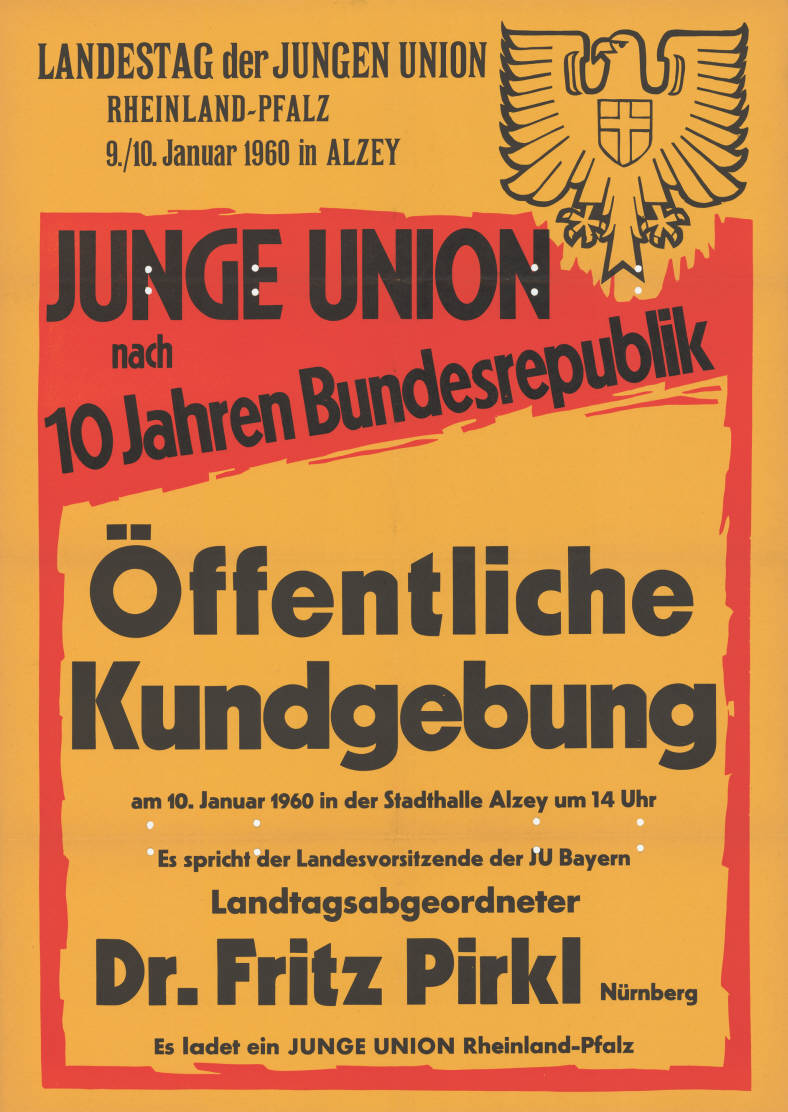 Landestag der Jungen Union Rheinland-Pfalz ... Junge Union nach 10 Jahren Bundesrepublik Öffentliche Kundgebung ... Es spricht der Landesvorsitzende der JU Bayern Landtagsabgeordneter Dr. Fritz Pirkl Nürnberg ... Abbildung: Deutschlandadler (Grafik) Plakatart: Ankündigungsplakat Auftraggeber: JU Rheinland-Pfalz Objekt-Signatur: 10-028 : 196 Bestand: Plakate von Jugendorganisationen der Parteien ( 10-028) GliederungBestand10-18: Plakate von Jugendorganisationen der Parteien (10-028) » CDU » Deutschland- , Landes- und Bezirkstage, Kongresse Lizenz: KAS/ACDP 10-028 : 196 CC-BY-SA 3.0 DE